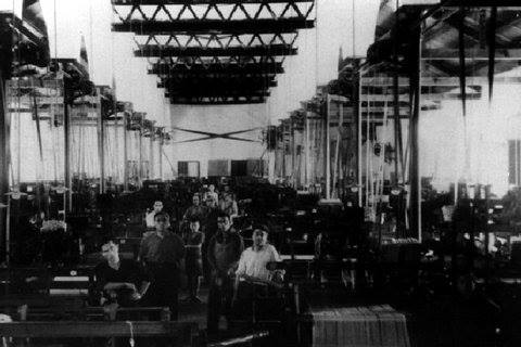 Telar de Priego de Córdoba en 1970